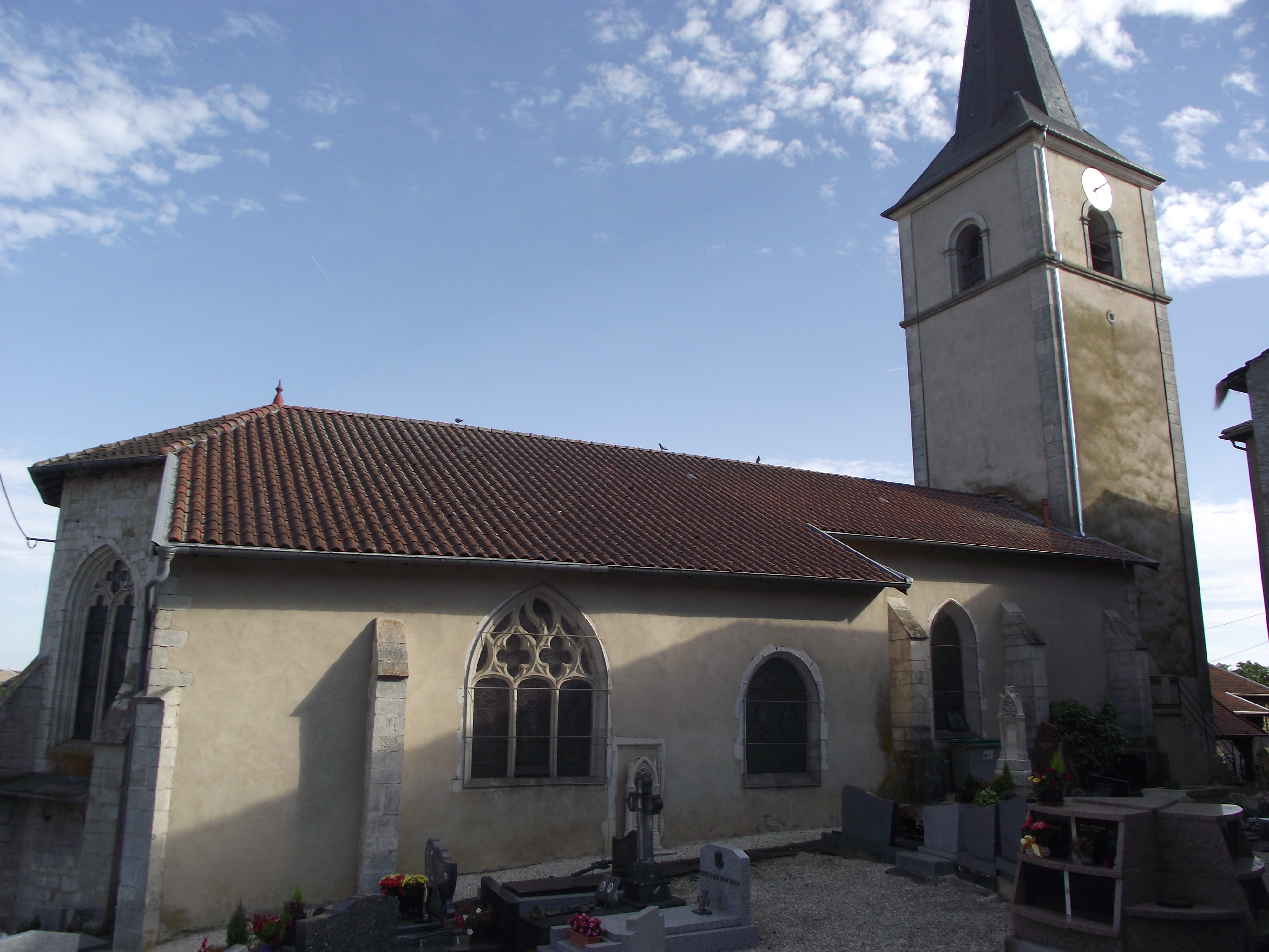 Église de Houdreville vue du coté gauche